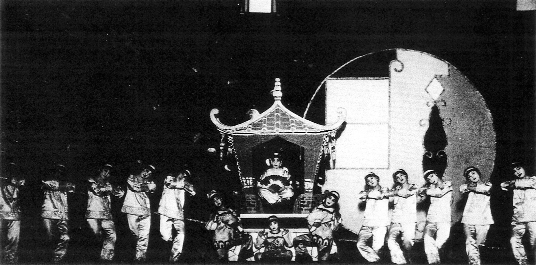 東京松竹楽劇部（後の松竹歌劇団 SKD）の初の単独公演「松竹座フォーリーズ」より「南京情緒」の場面。